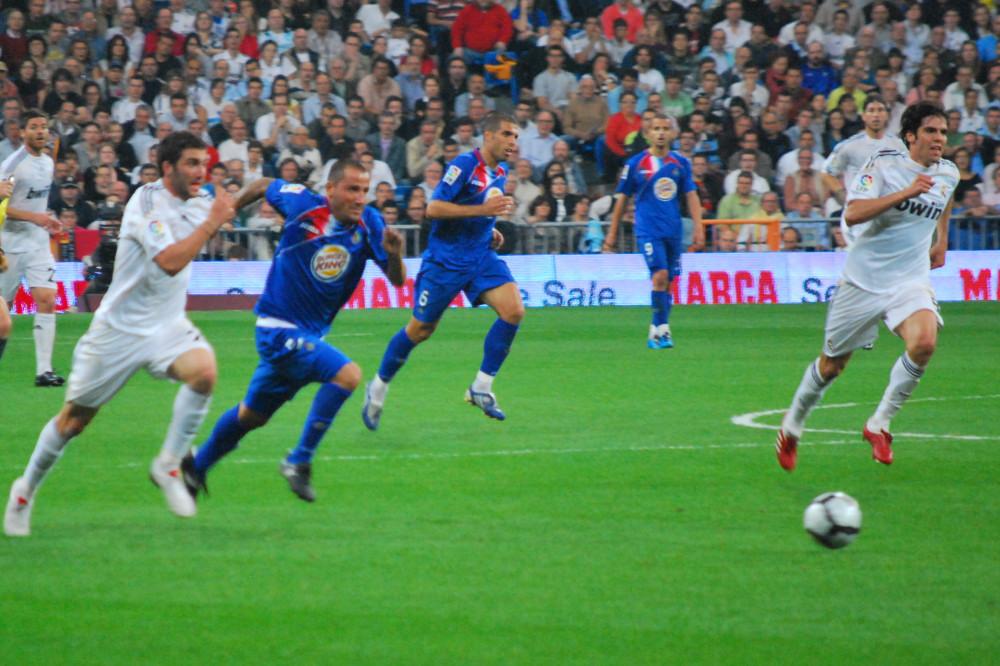 Santiago Bernabeu Real Madrid 2 - Getafe 0 31-10-09